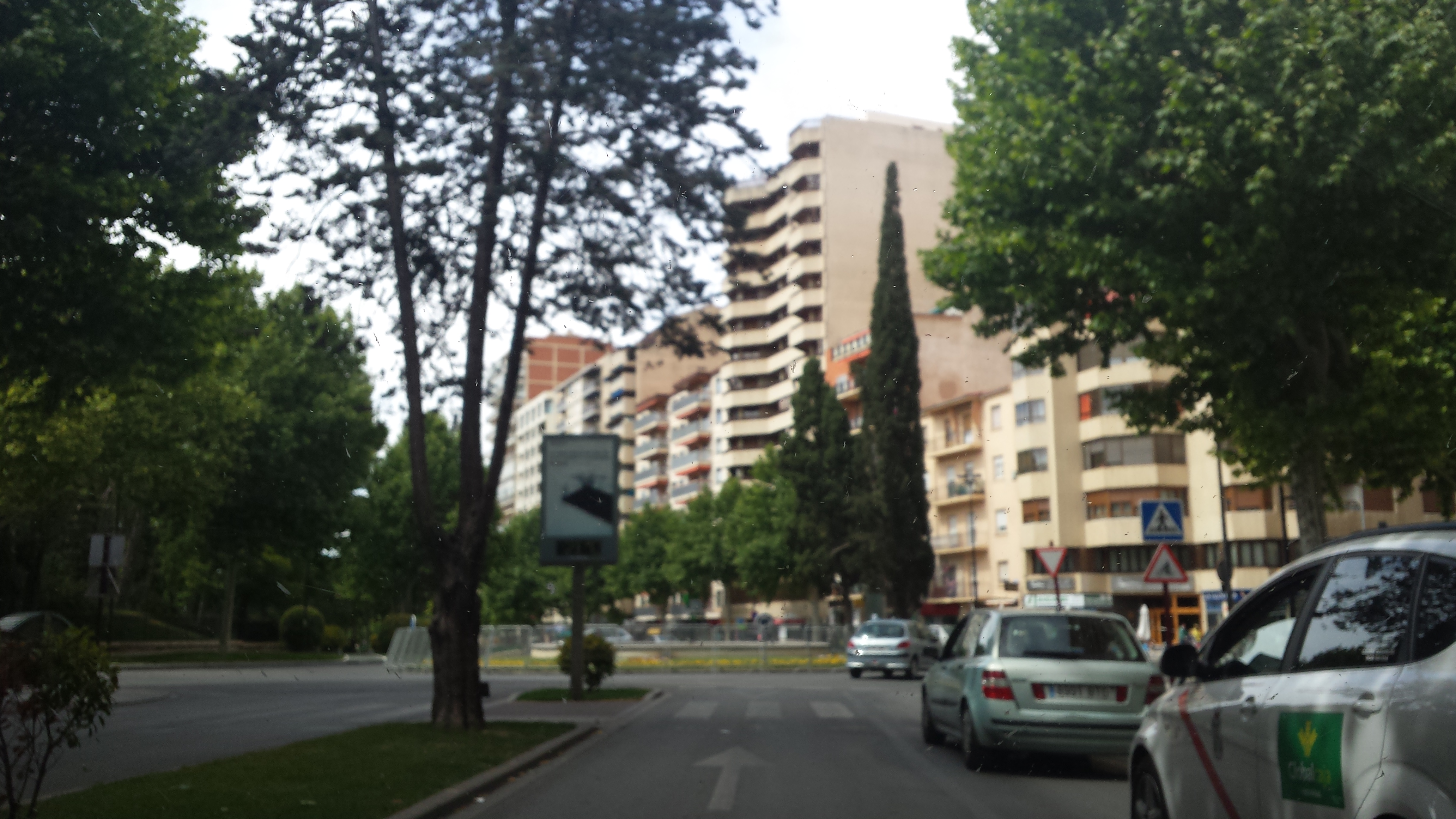 Avenida de España. Plaza Benjamín Palencia. Albacete